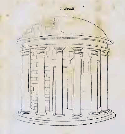 Représentation de l'Aedes Aemiliana Herculis par Baldassare Peruzzi